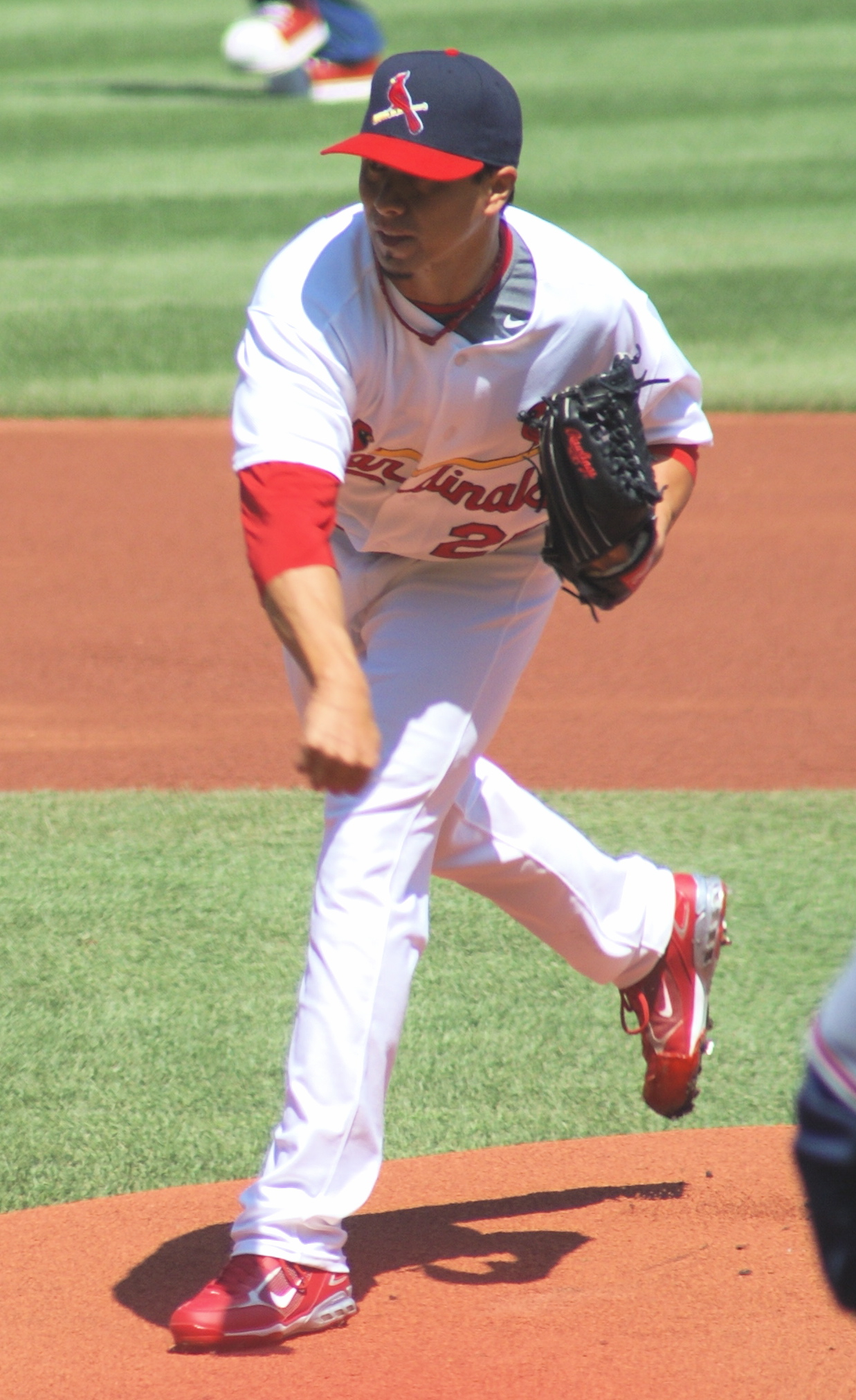 Kyle Lohse